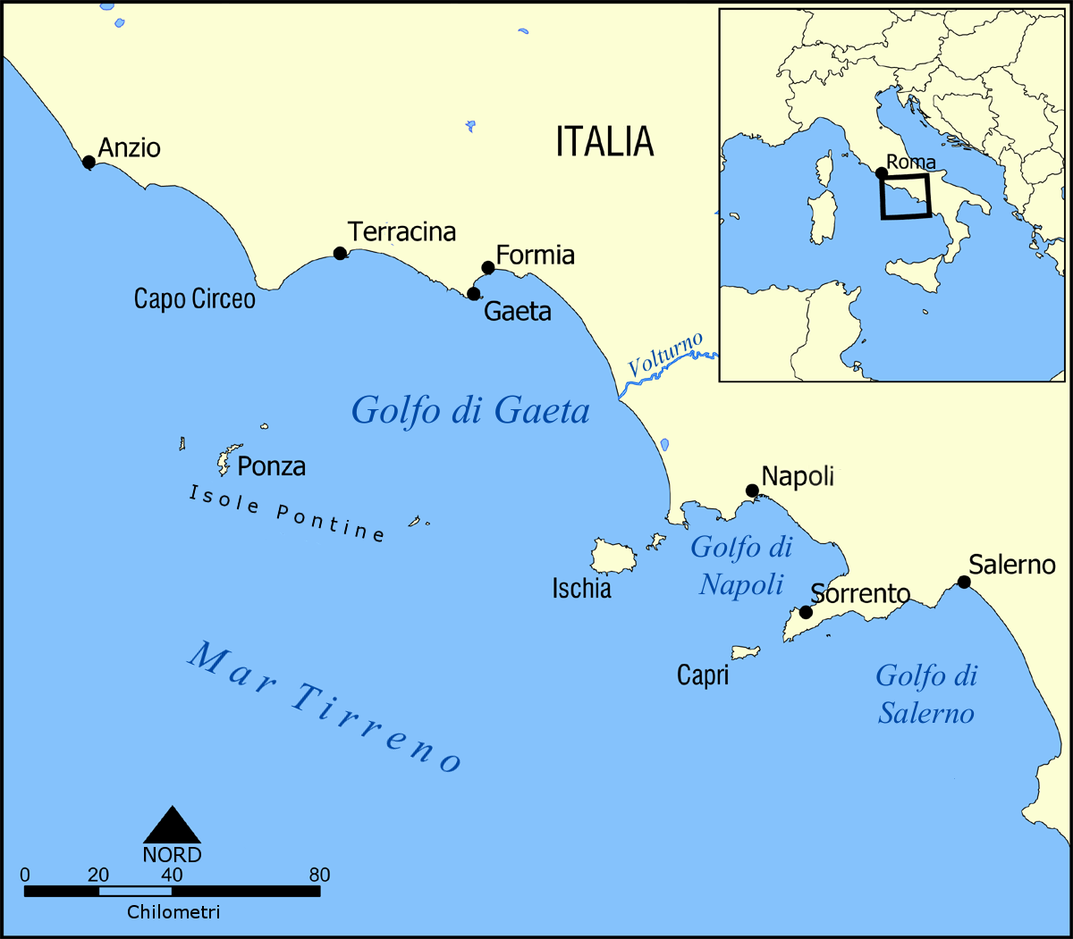 tradotto dalla versione inglese di Gulf of Gaeta map